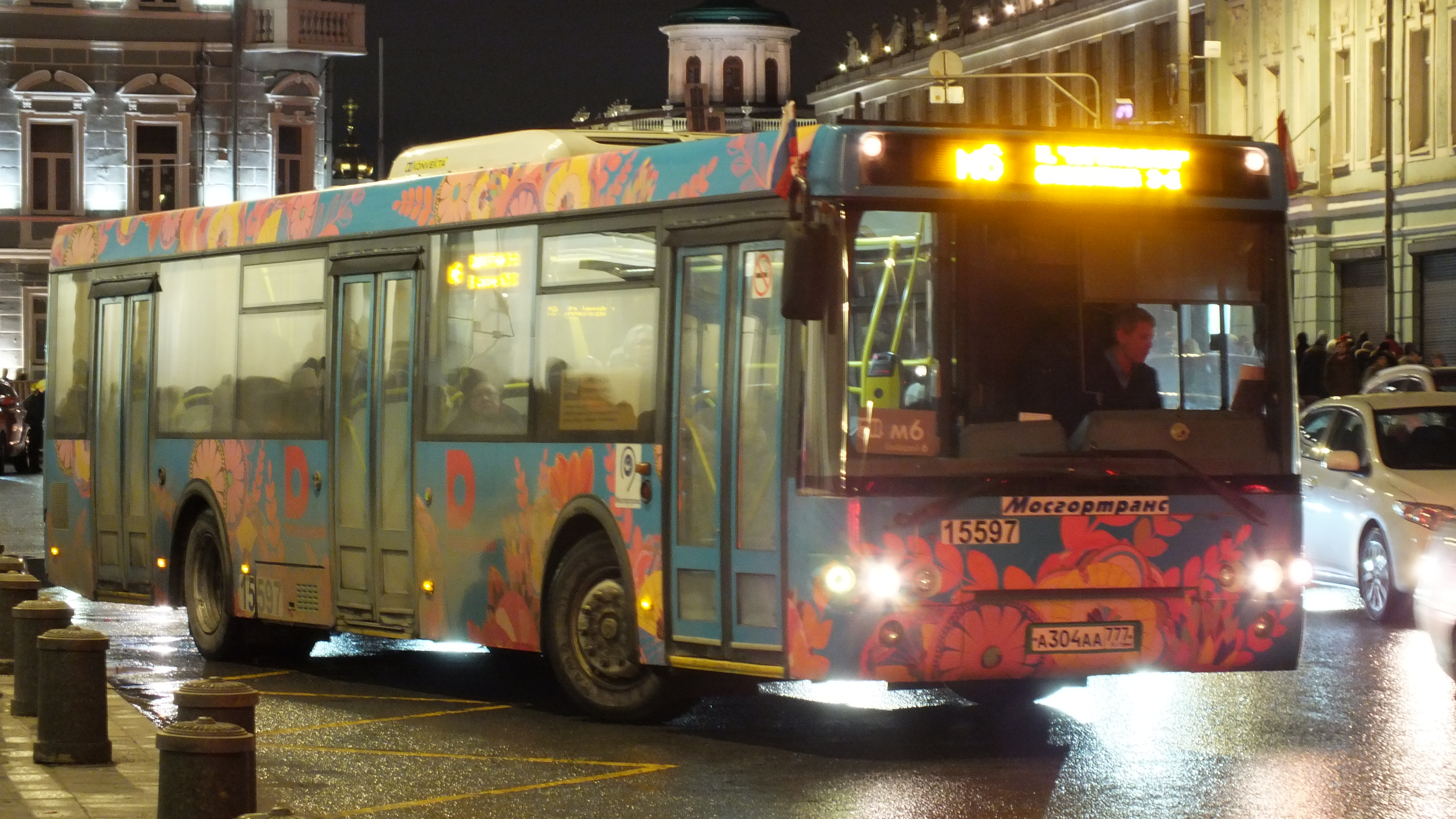 Автобус маршрута М6 ночью на Моховой улице